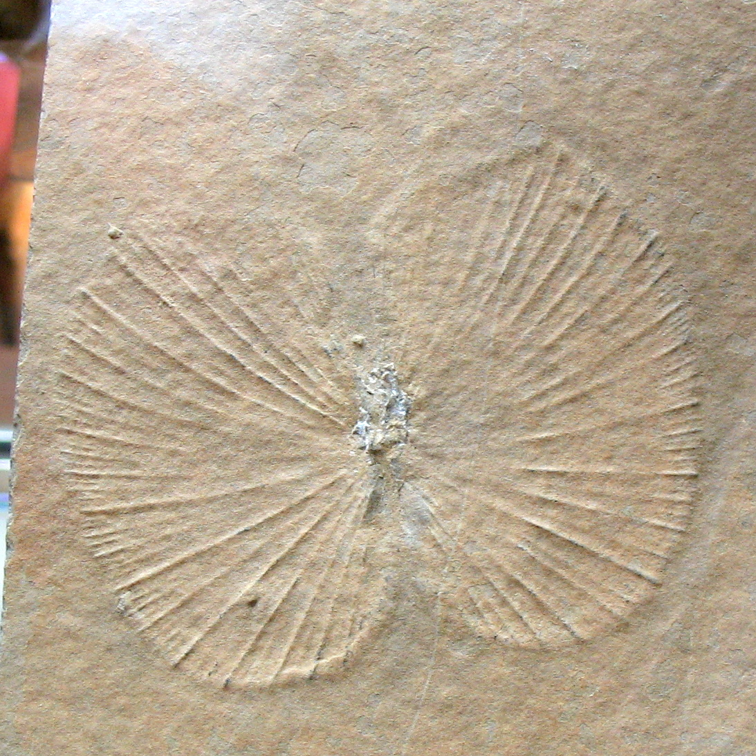 Daonella lommeli. Molusco bivalvo del Triásico de Alcover (Tarragona, España) - Ejemplar en el Museo Geominero de Madrid (Cat.: 156T).